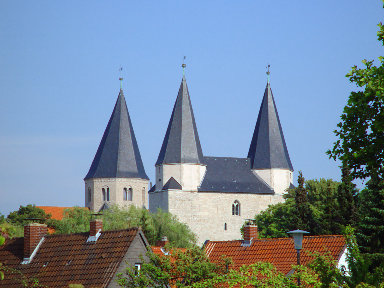 Beschreibung: Kaiserdom in Königslutter Aufnahmedatum: 24. Juni 2006 Fotograf: ArtMechanic